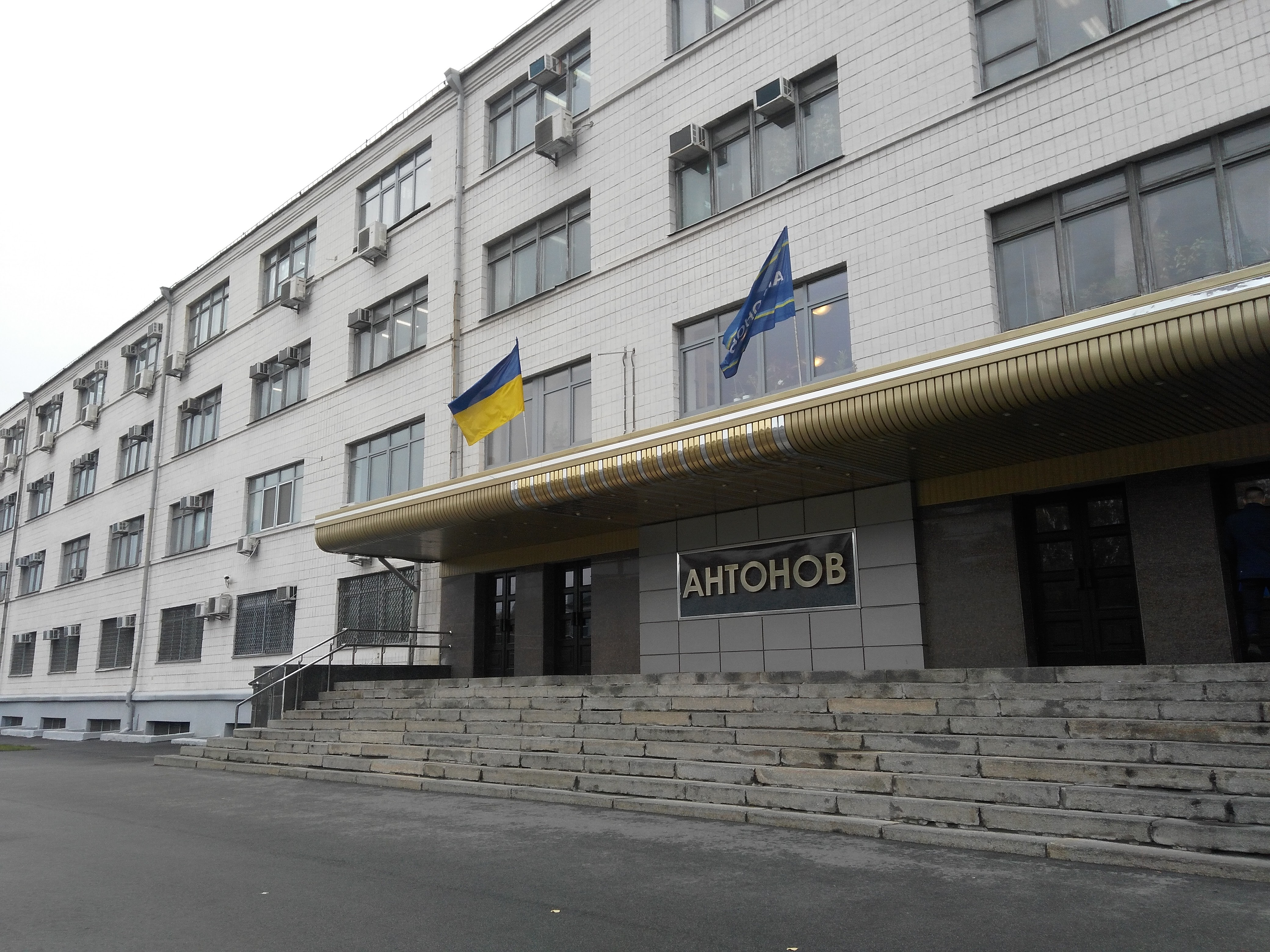 Фотографія корпусу заводу "Антонов" у Києві на вул. Туполєва